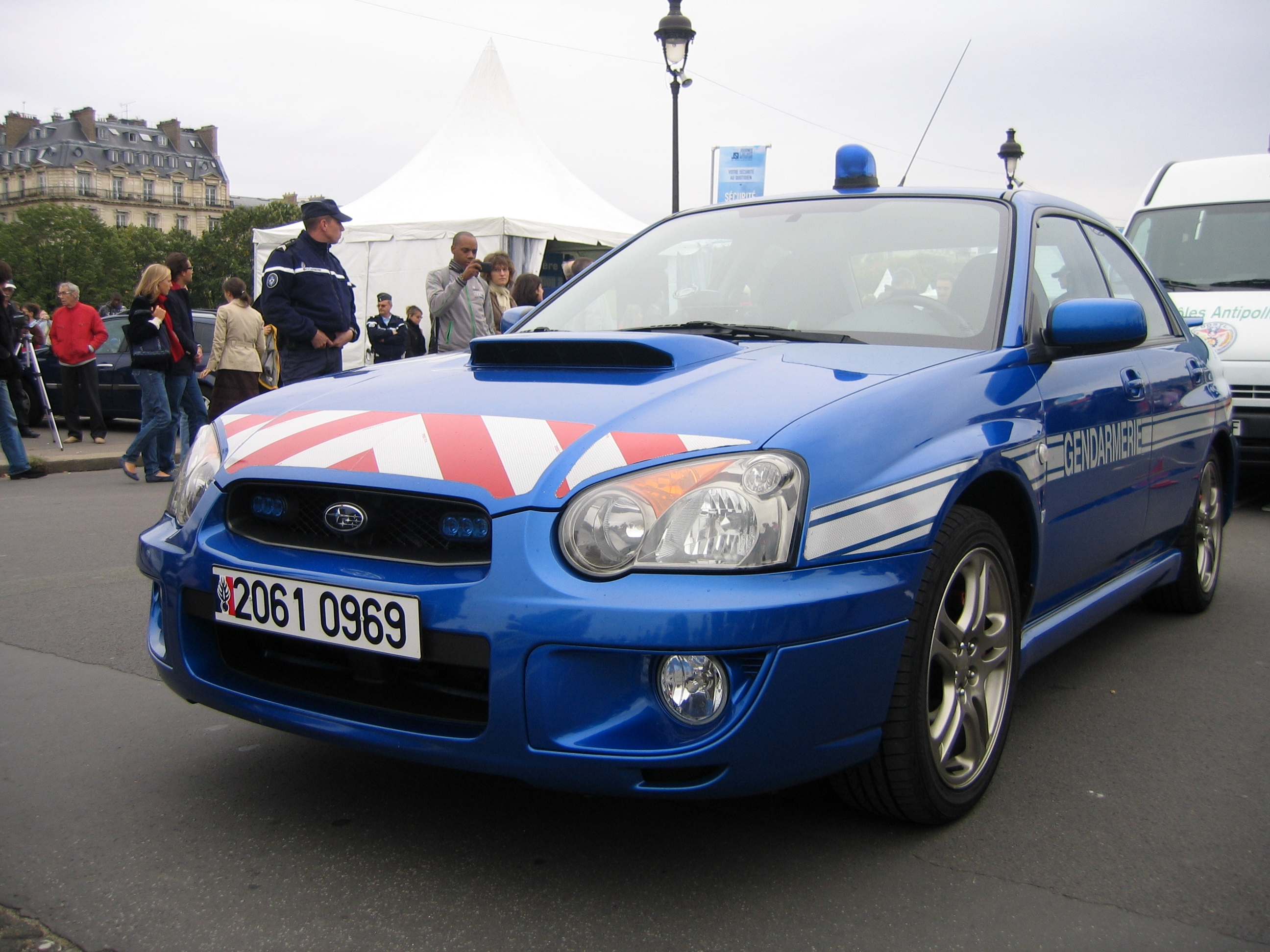 Une Subaru de la gendarmerie française lors des journées de sécurité intérieures 2009 sur l'esplanade des Invalides.